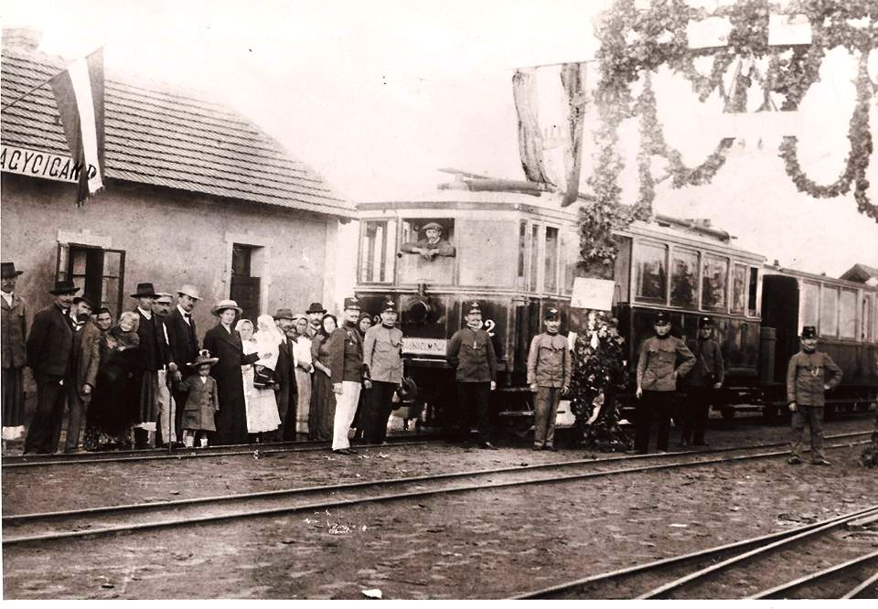 A Bodrogközi Kisvasút nagycigándi állomása 1920 körül.